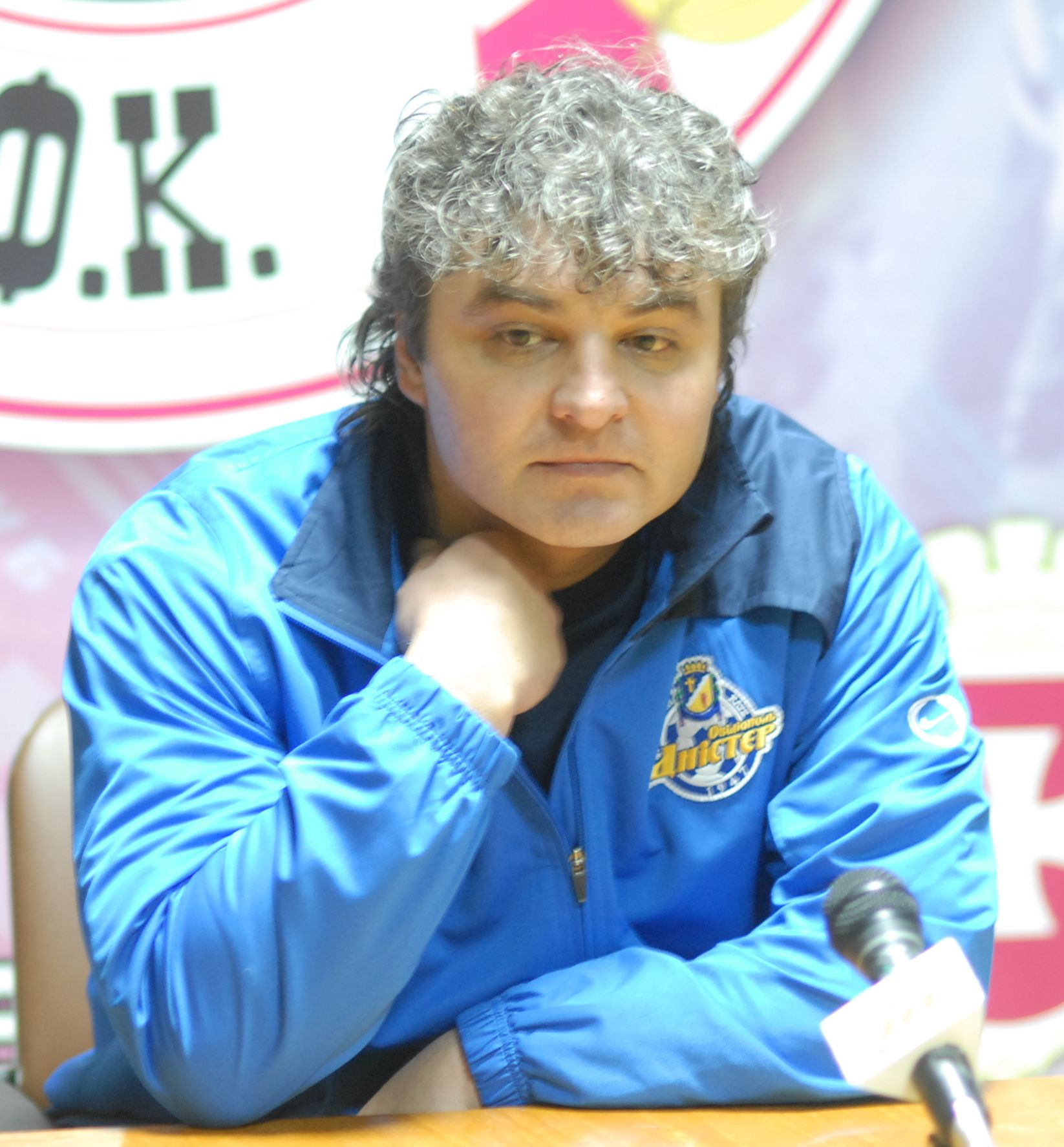 Тимерлан Гусейнов / Timerlan Huseinov, former Soviet and Ukrainian soccer player